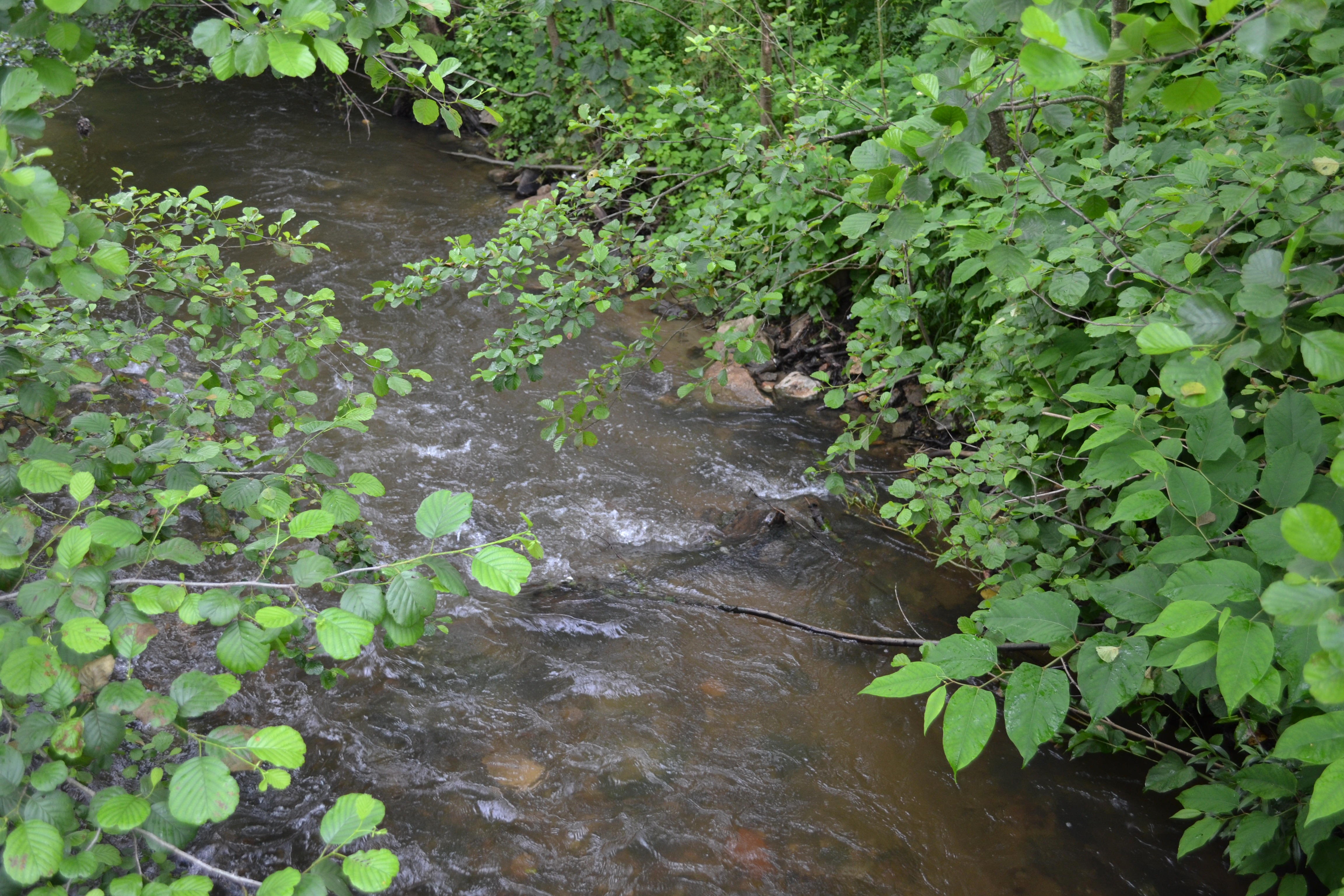 Západný Turiec (prítok Slanej) pretekajúci medzi obcami Sása a Ratkovská Lehota (foto z mosta)